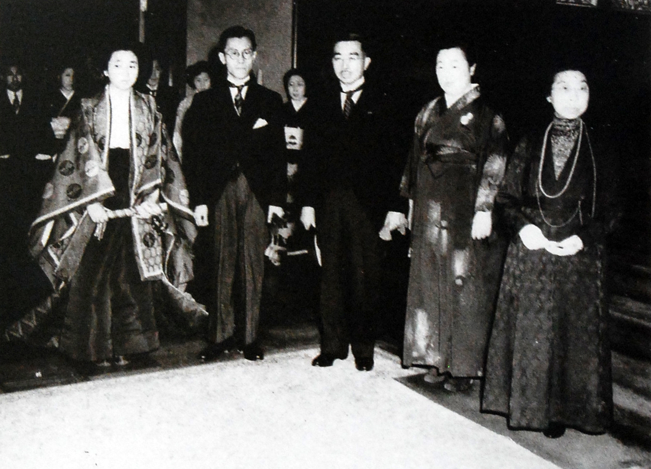 昭和天皇の皇女・和子内親王の結婚式。貞明皇后・香淳皇后・昭和天皇も列席している。